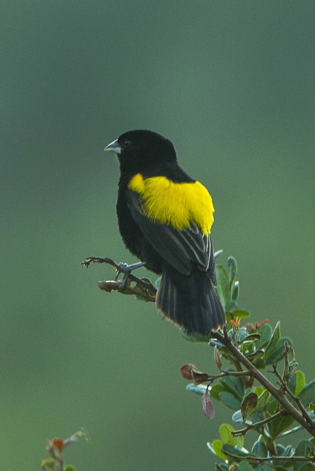 Yellow Bishop - Kenya_S4E8557